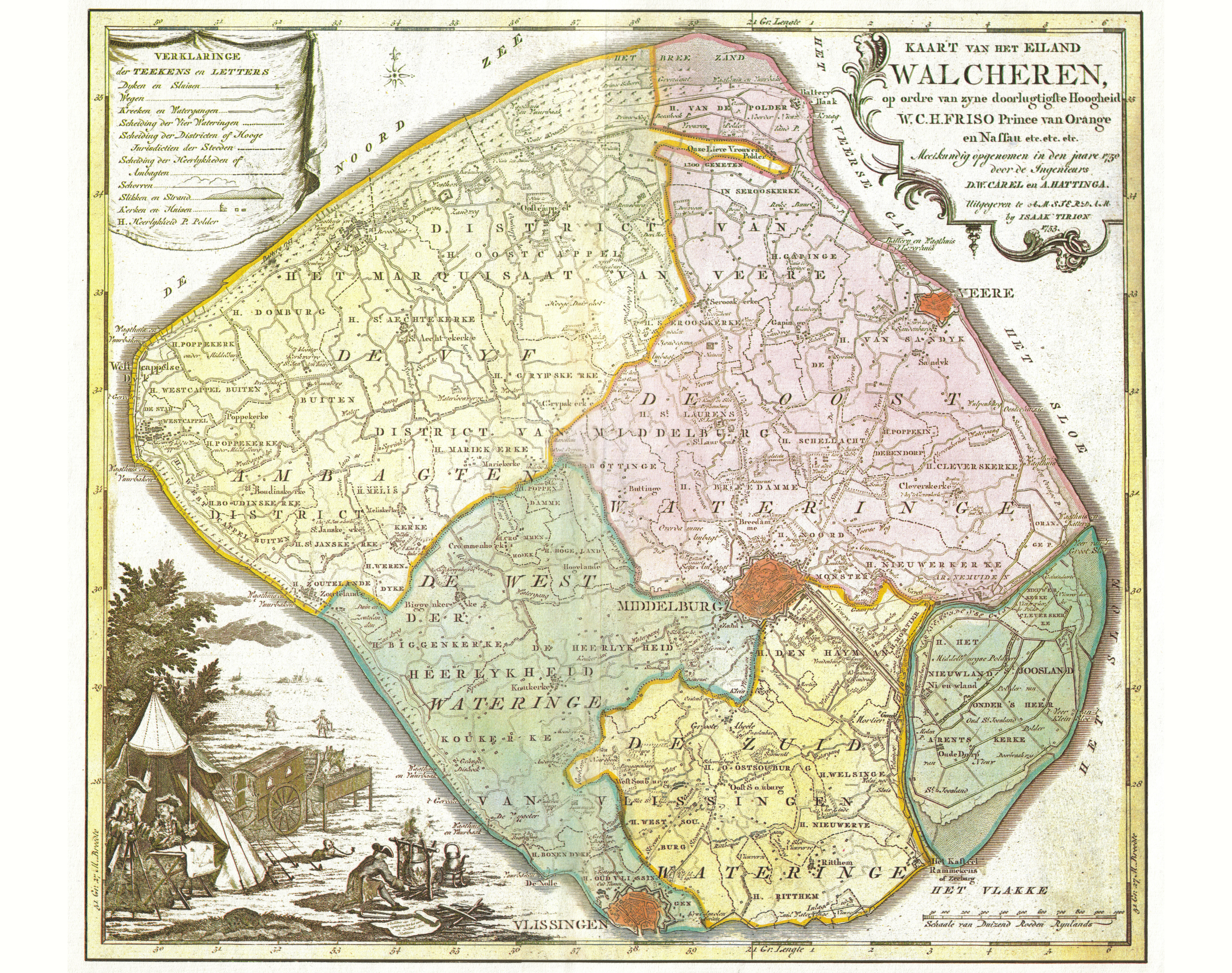 Plattegrond van het eiland Walcheren in de 18e eeuw